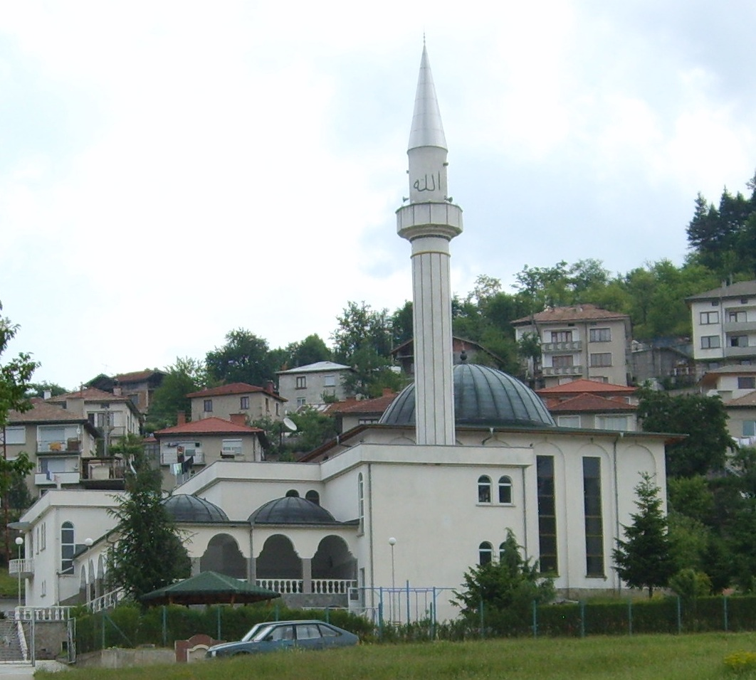 Джамията в Рудозем.